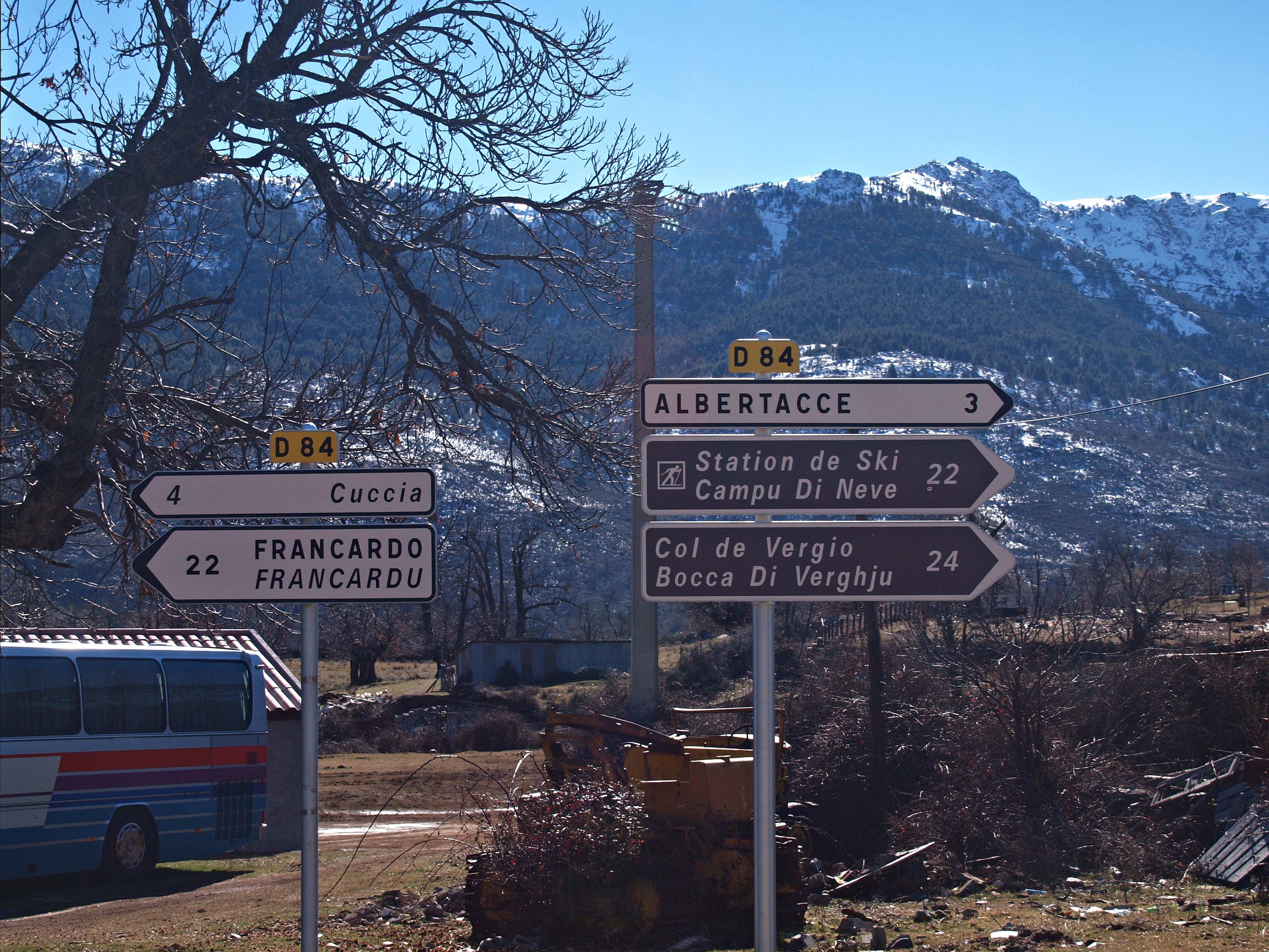 Calacuccia (Corse) - Panneaux routiers sur la D84